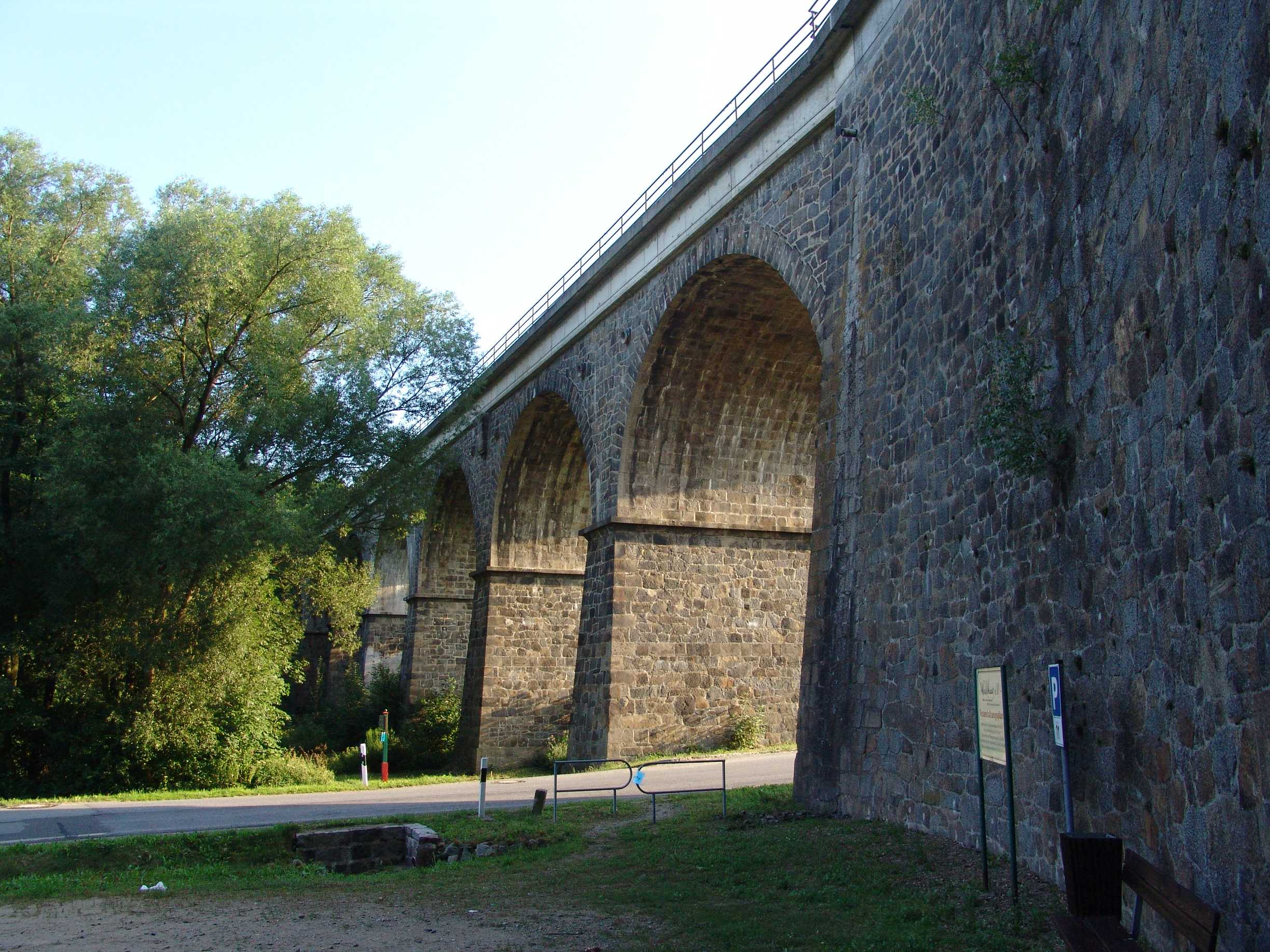 Dürrhennersdorfer Eisenbahnviadukt